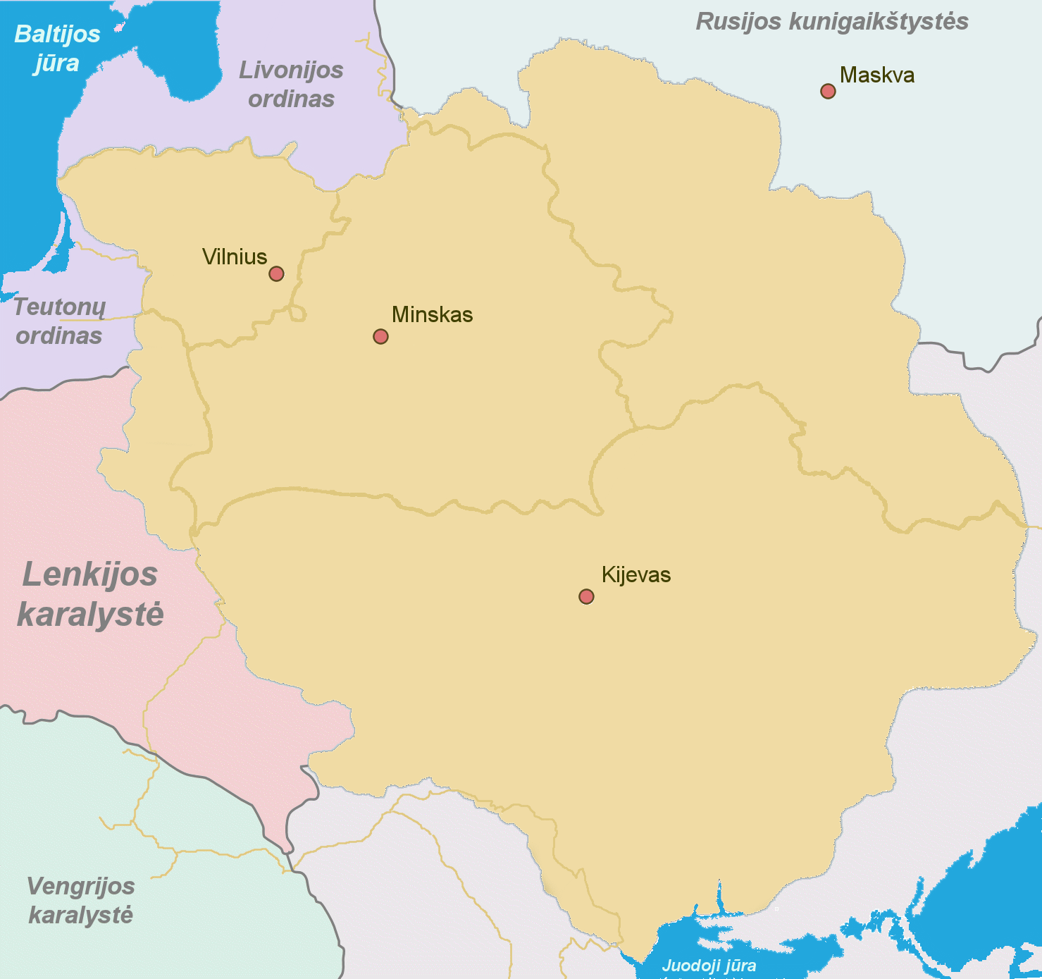 Vytauto laikų LDK teritorija ir dabartinių valstybių sienos (vėliau mėginsiu pripiešti kaimynines to meto valstybes)